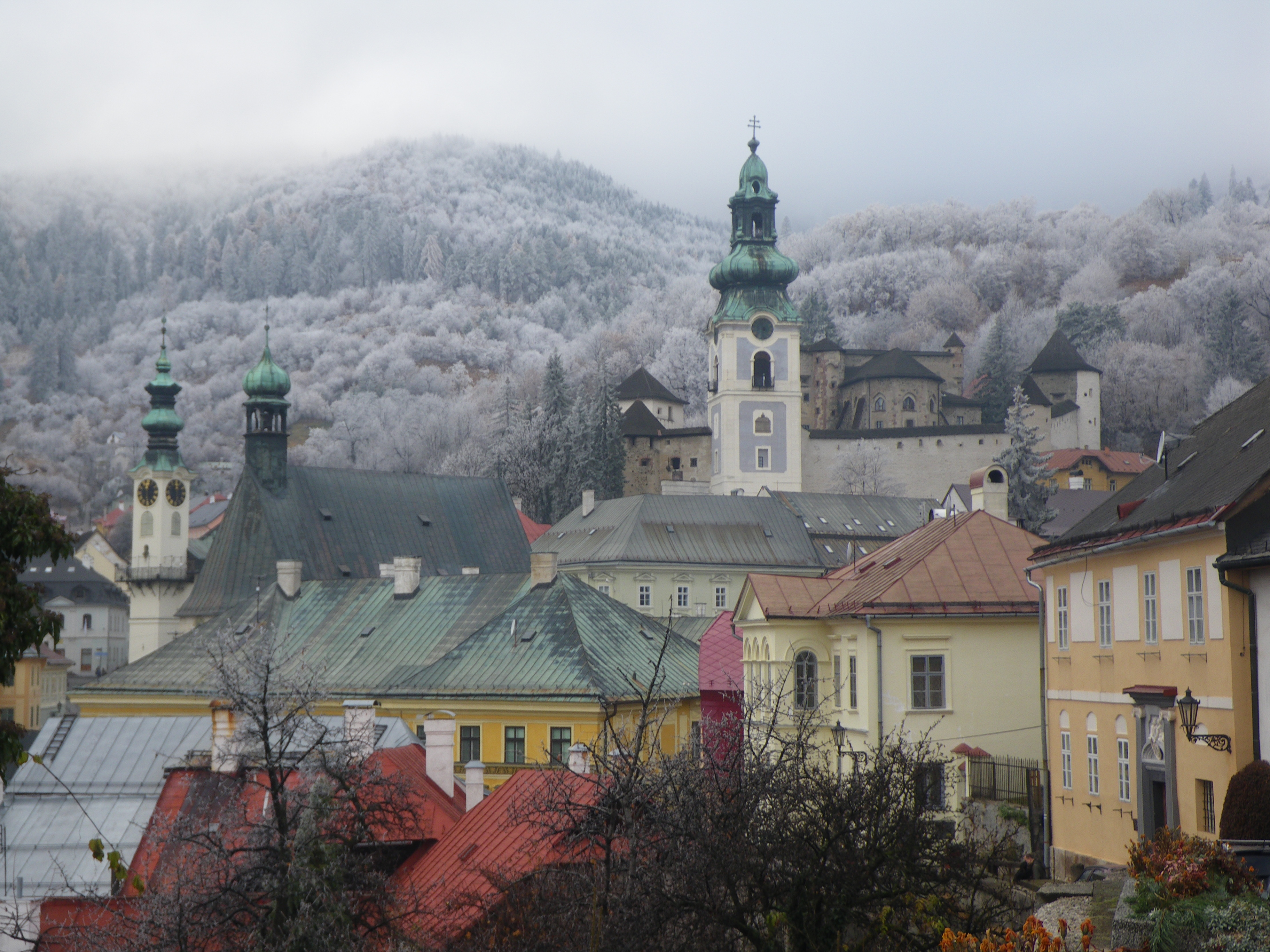 Banská Štiavnica im November 2011